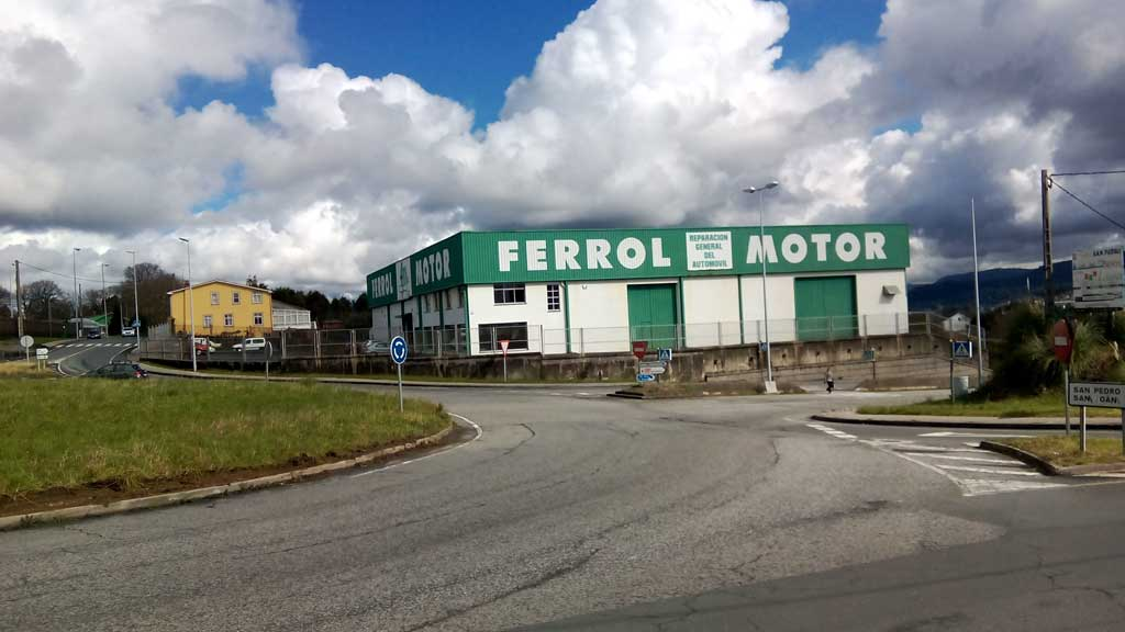 Vista do Vinculeiro, Santa Icía, Ferrol.